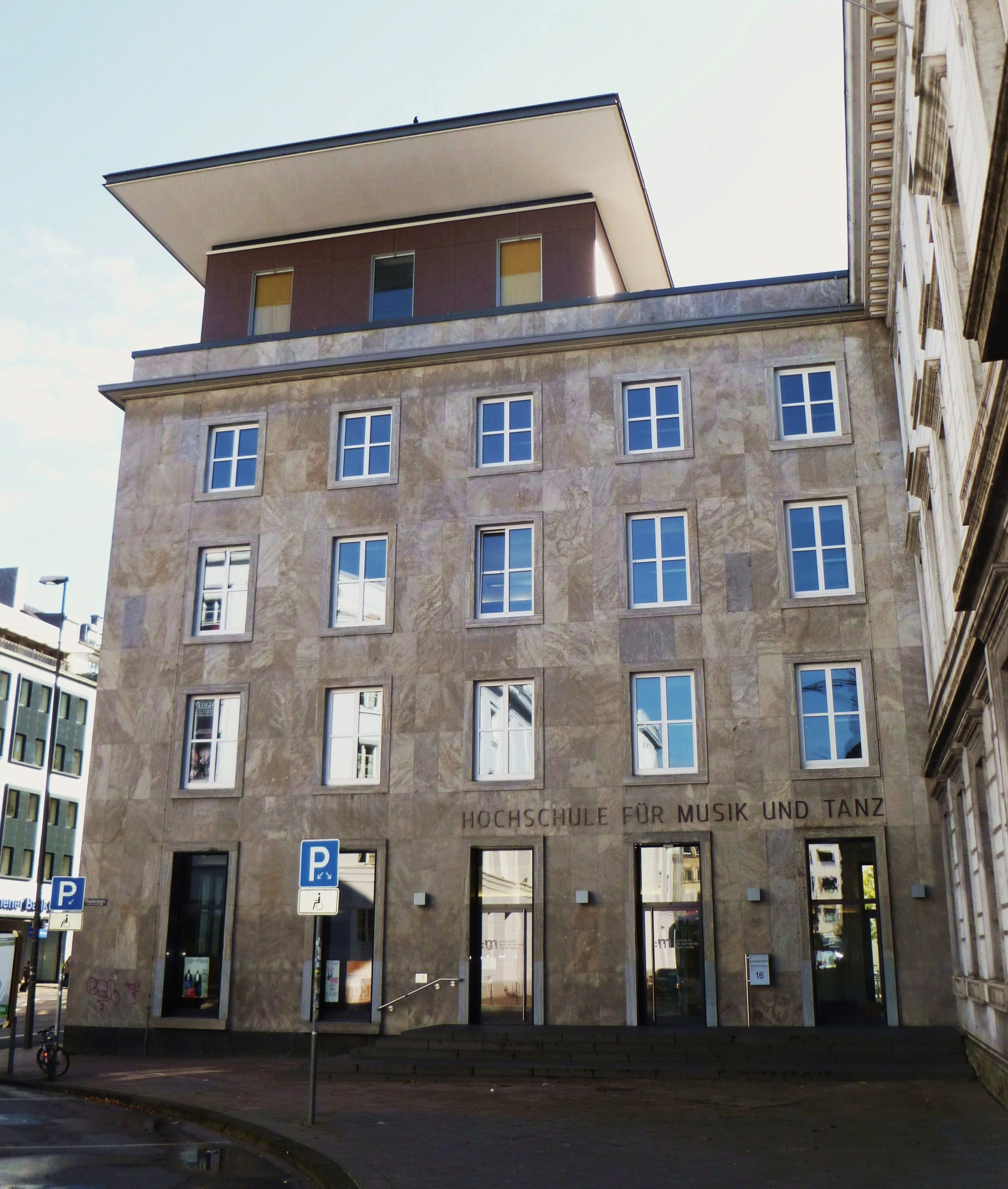 Musikhochschule Köln, Abteilung Aachen, Theaterstraße